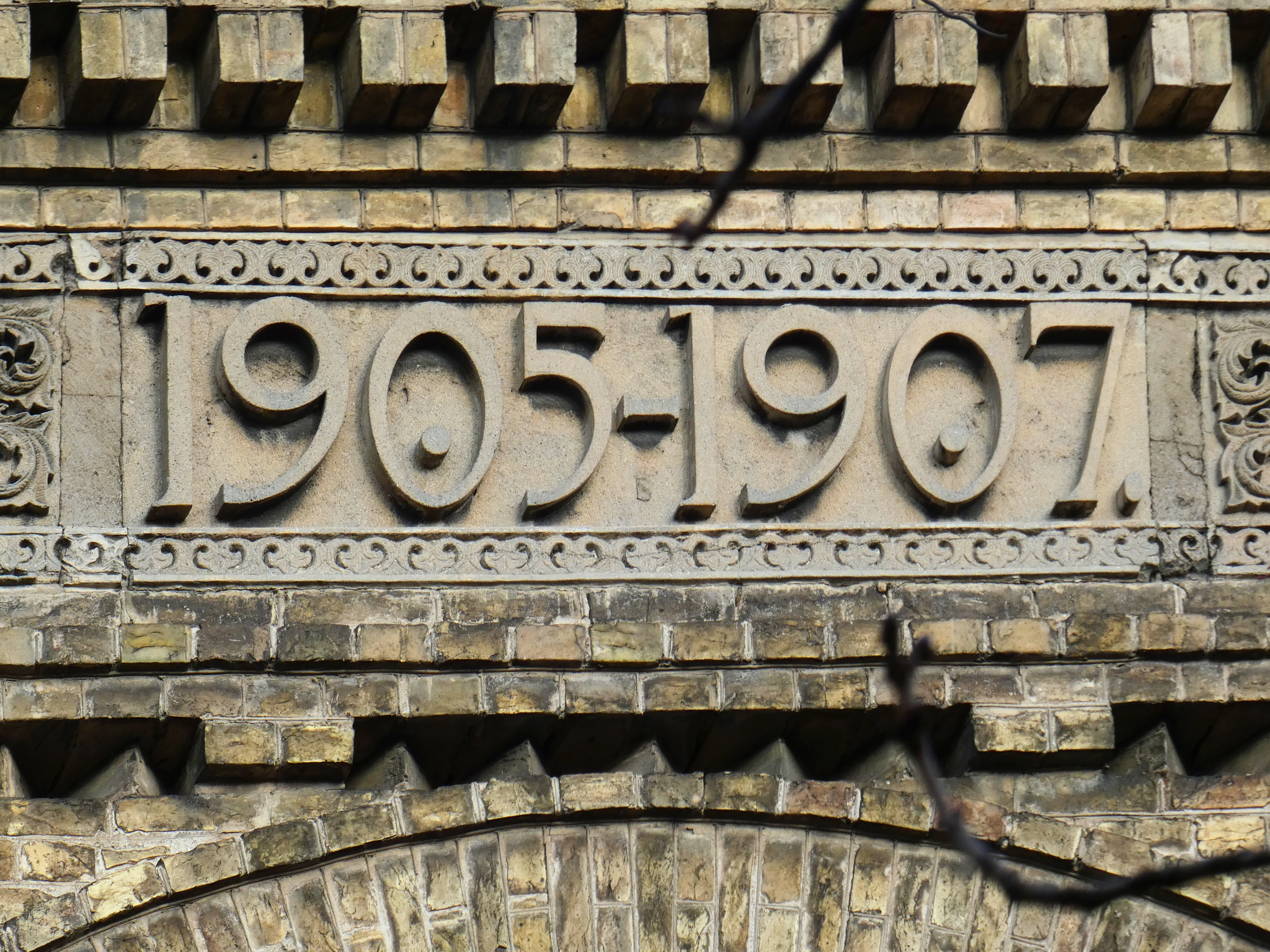 Дата будівництва. Будинок економічної школи, де в 1937–1941 роках містилась 13-та артилерійська спецшкола, Київ, вул. Ярославів Вал, 40